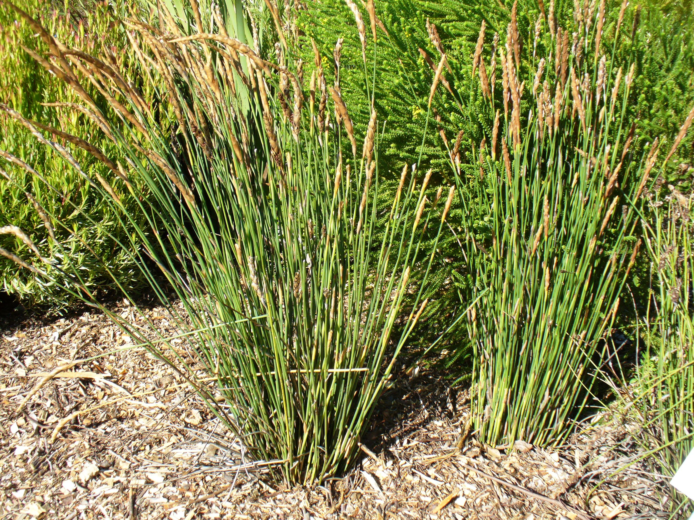 Kirstenbosch Gardens, Cape Town